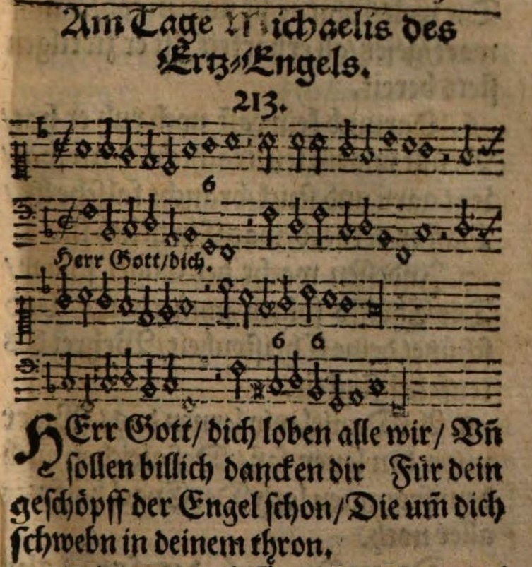 Herr Gott, dich loben alle wir, Lied zum Michaelistag von Paul Eber (1554, nach Melanchthons Dicimus grates tibi), 1. Strophe